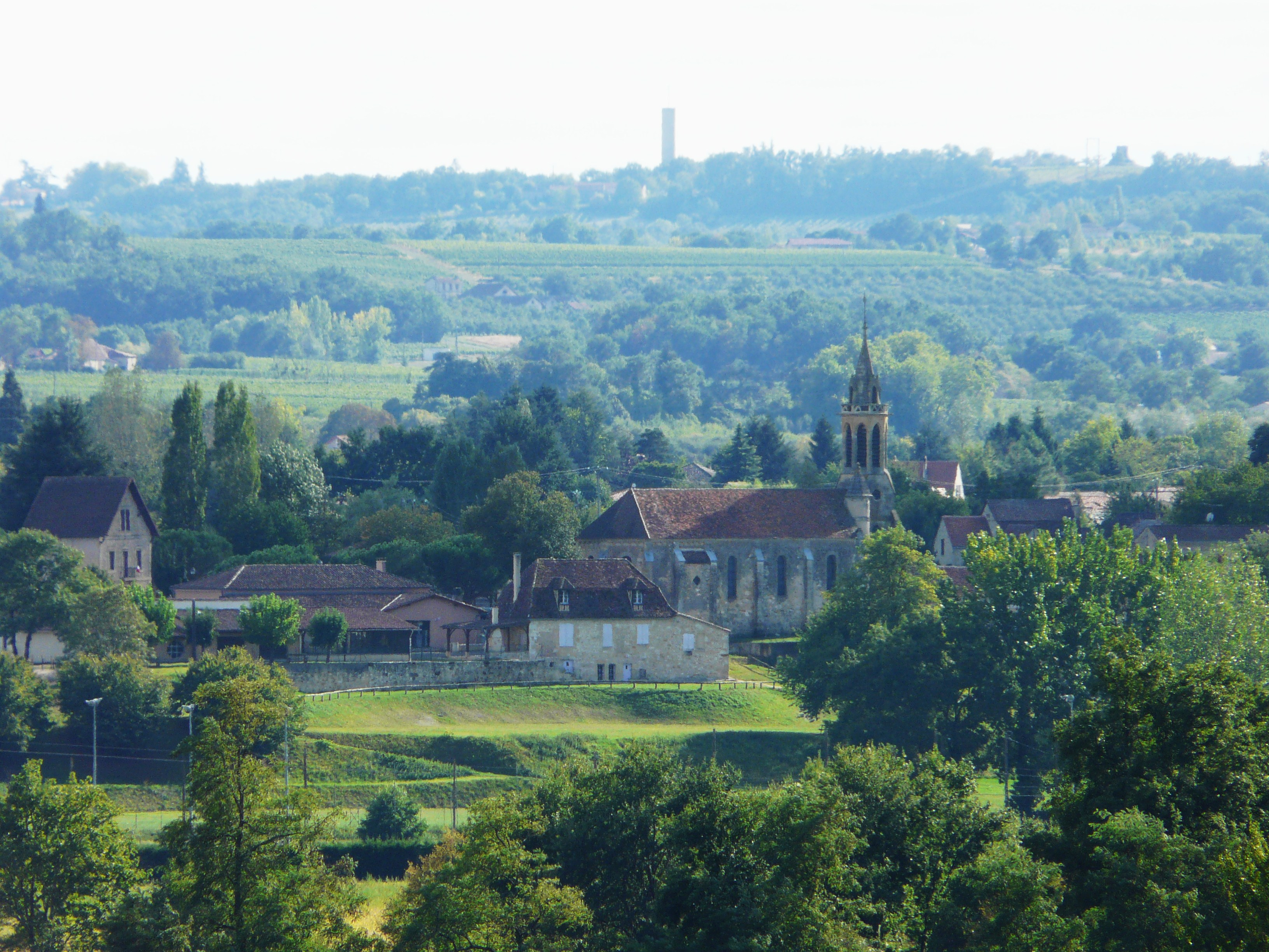 Le village de Cours-de-Pile vu depuis les terrasses du château de Tiregand à Creysse, Dordogne, France.